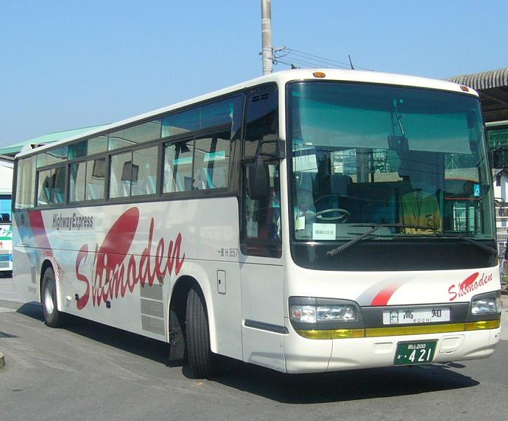 陸運番号 岡山200か・421 下津井バス所属 高速用車両（各系統で共通運用） 2006年4月8日 高知駅前にて撮影